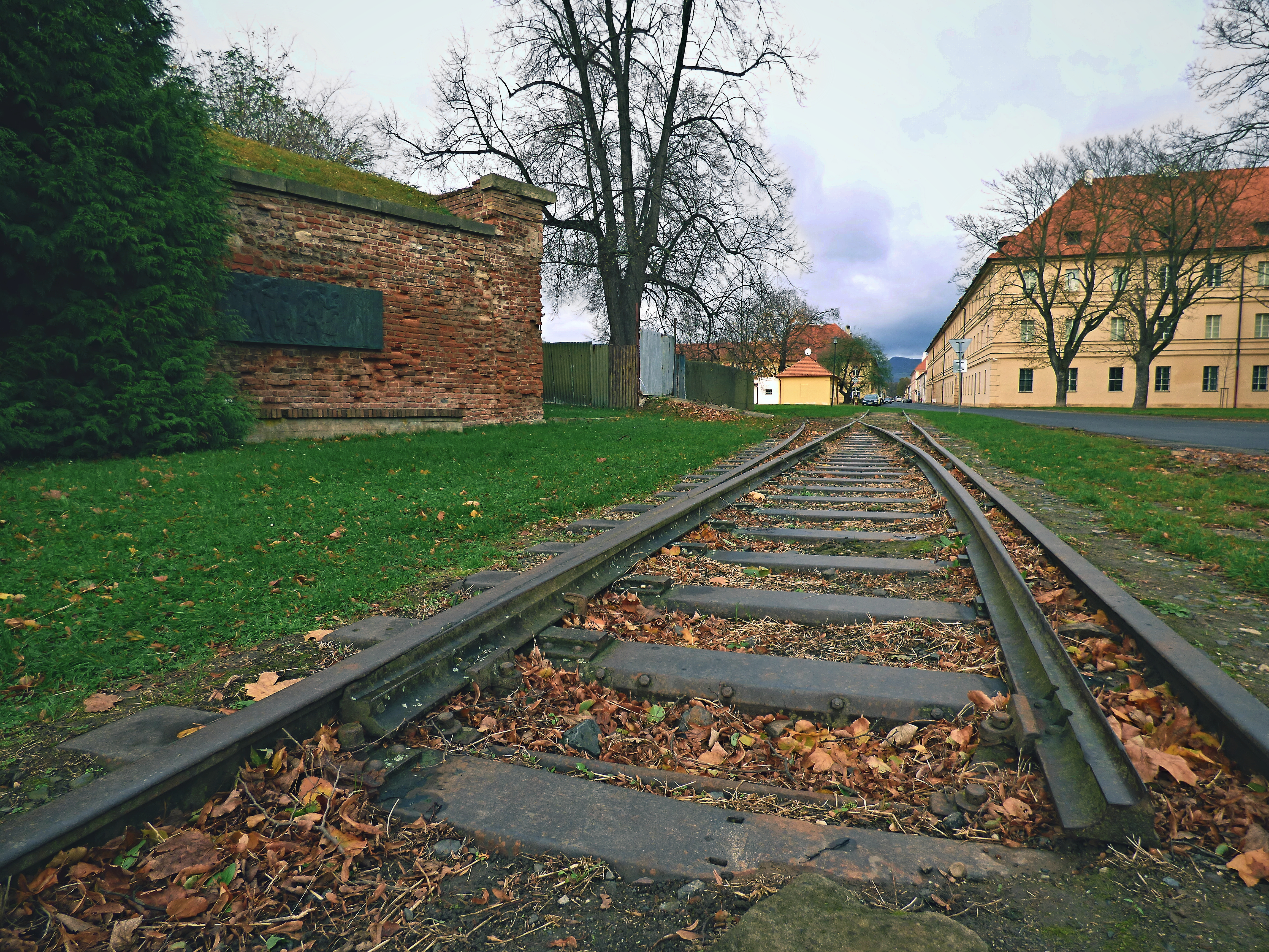 Výhybka v Dlouhé ulici, kousek za ní byla druhá výhybka umožňující větvení vlečky na dvě koleje.